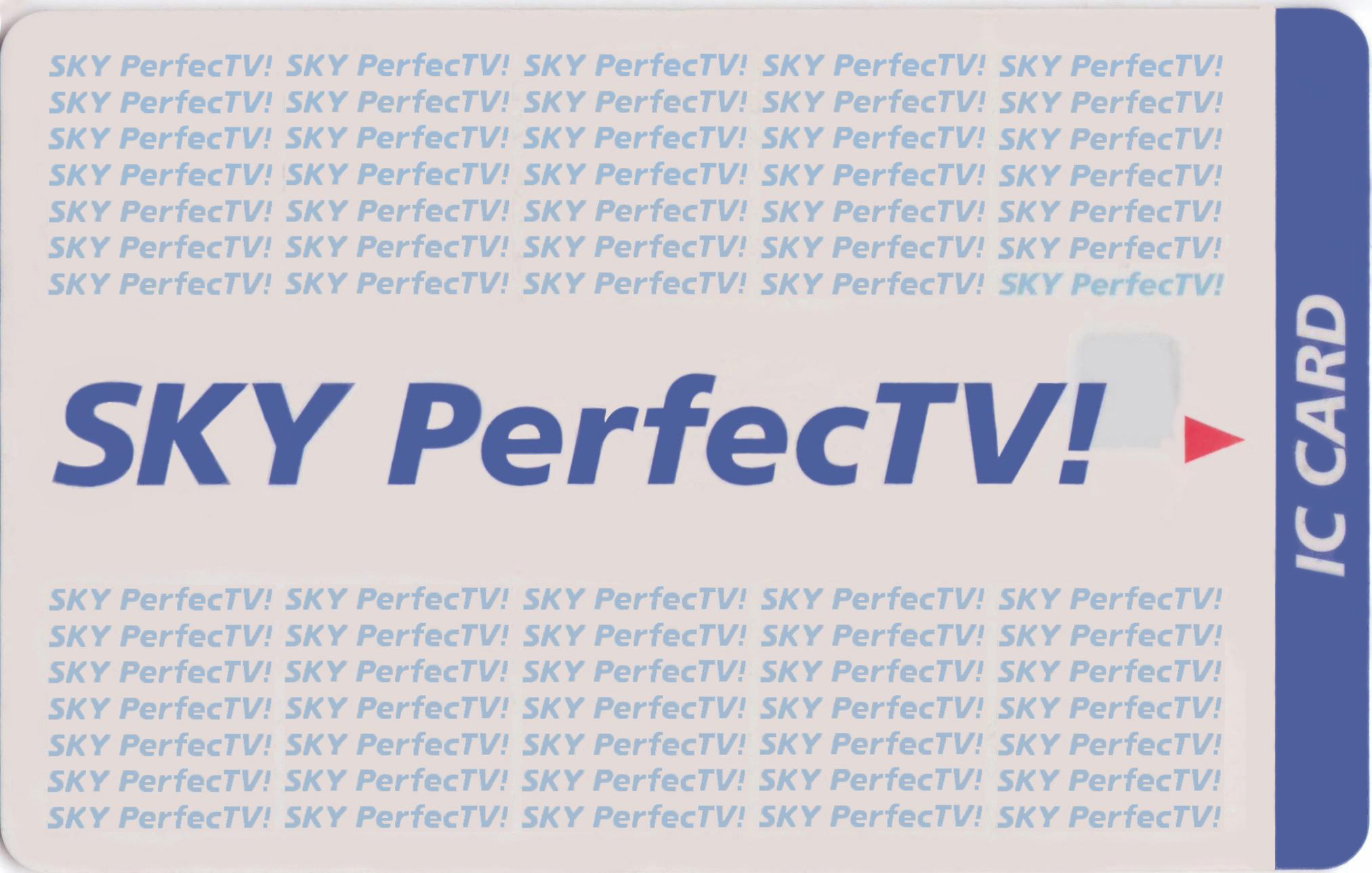 自宅にてキャナーで取り込み